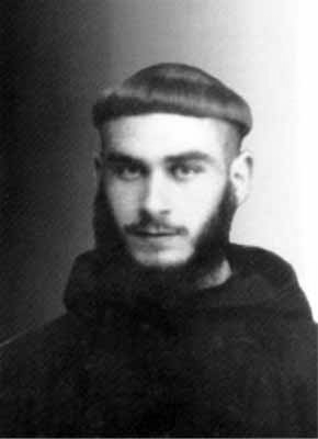 Enrique de Almazora